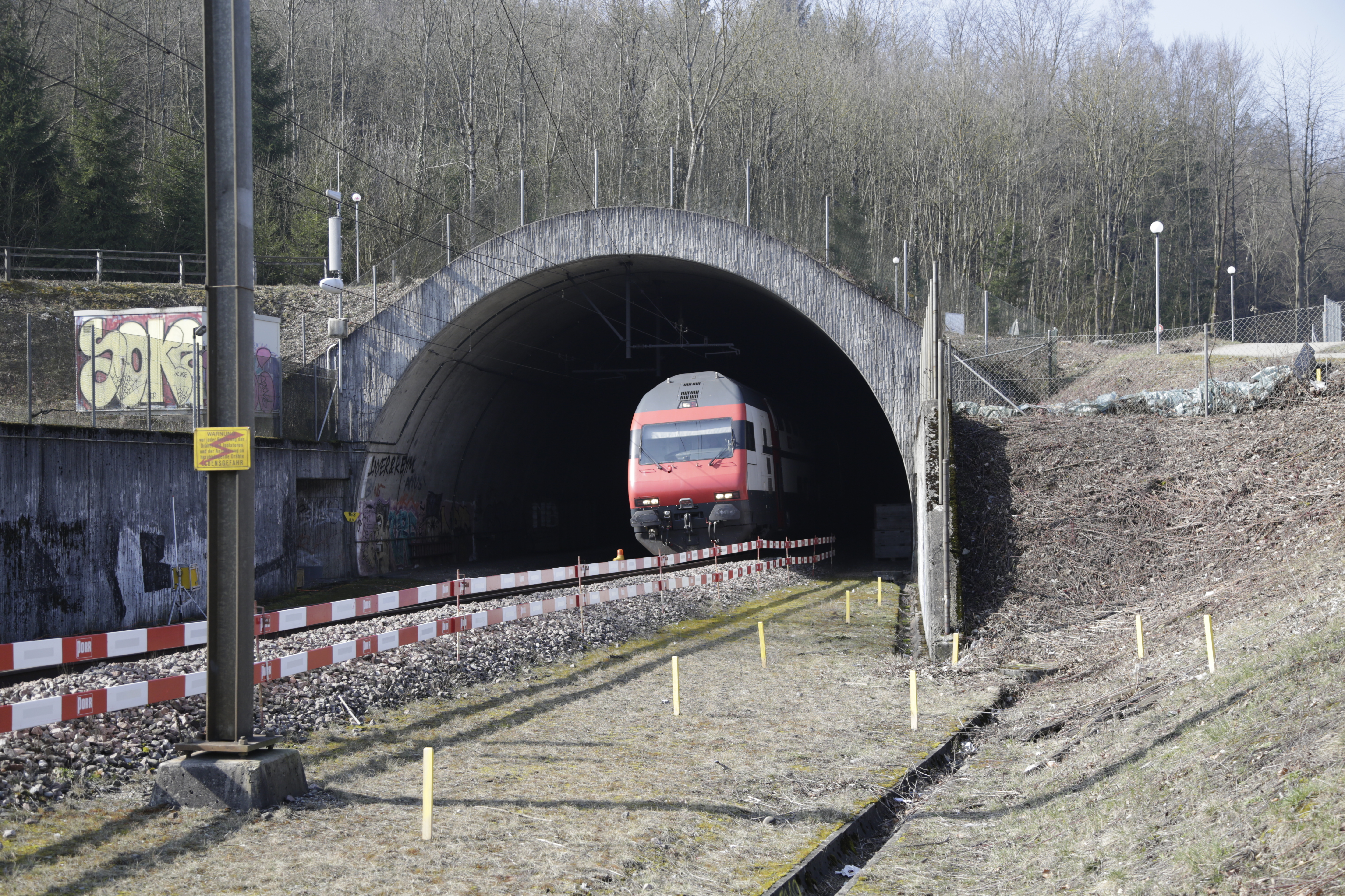 Das östliche Tunnelprotal des Hagenholztunnel.